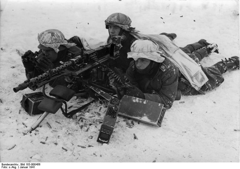 Übung des Regiments Großdeutschland, am MG 34 Scherl Bilderdienst, Berlin Gefechtsübung des Infanterie-Regiments "Grossdeutschland" In diesen Tagen wurde eine grosse Gefechtsübung des Ersatzbataillions des Infantrie-Regiments "Grossdeutschland" durchgeführt, bei der alle Waffengattungen in Aktion traten. Unser Bild zeigt ein schweres M.G. in Feuerstellung. Die Mannschaften haben sich mit weissen Taschentüchern und Decken gegen Fliegersicht getarnt. 25.1.41 [Herausgabedatum]